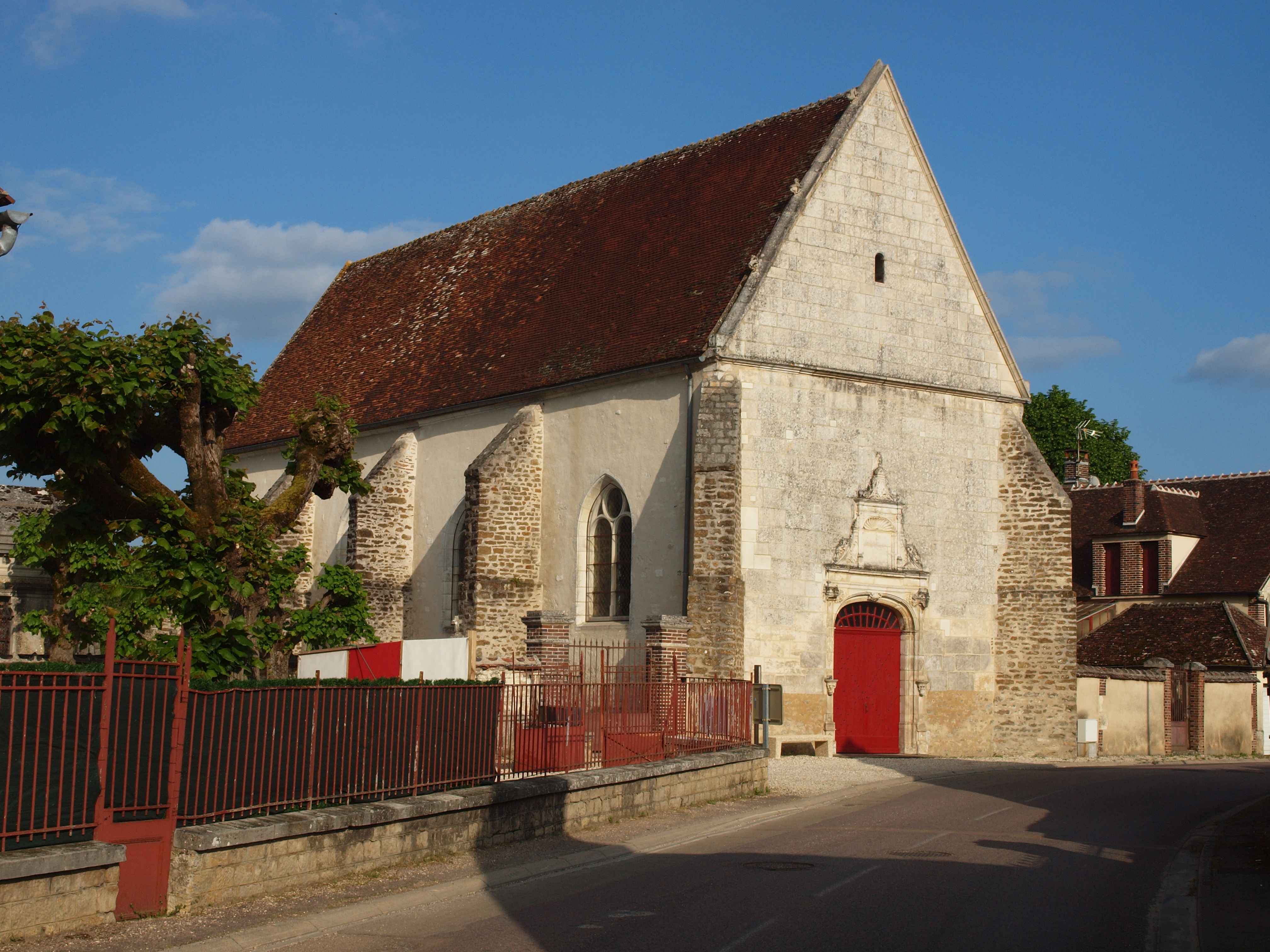 Bonnard (Yonne, France)